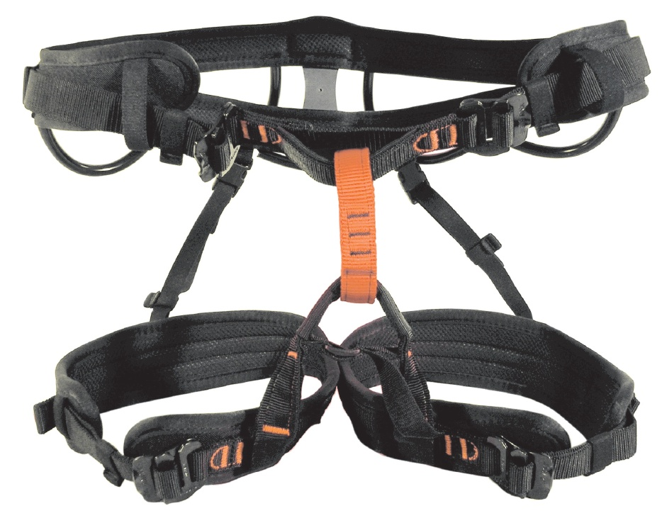 Questa foto è stata concessa in uso da Kong per Wikipedia. l'autore non conoscendo i termini della licenza CC a affidato al sottoscritto di fare "come meglio credi"